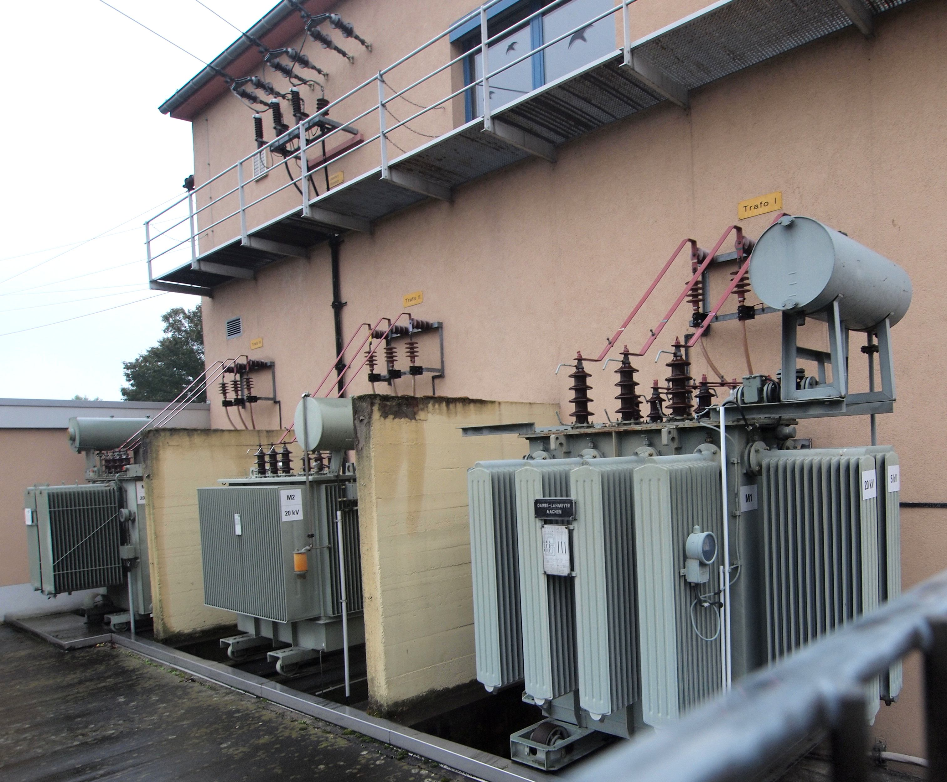 Neckar-Kraftwerk in Schwabenheim (Dossenheim)